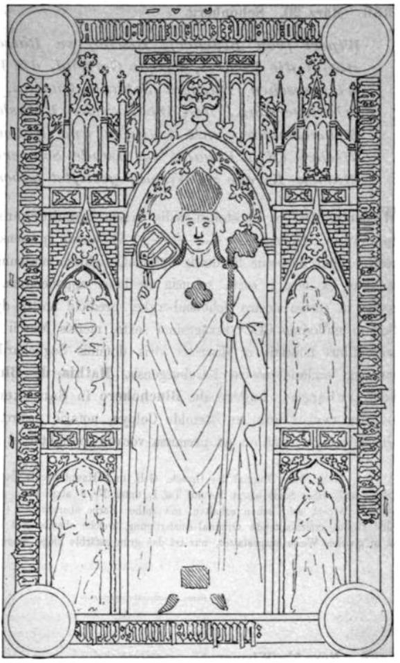 Grabstein des Bischof Wippert von Blücher (1356–1376) Bischof von Ratzeburg im Dom von Ratzeburg Original caption: “Grabstein des Bischofs Wipert von Blücher (+ 1367) im Dom zu Ratzeburg”